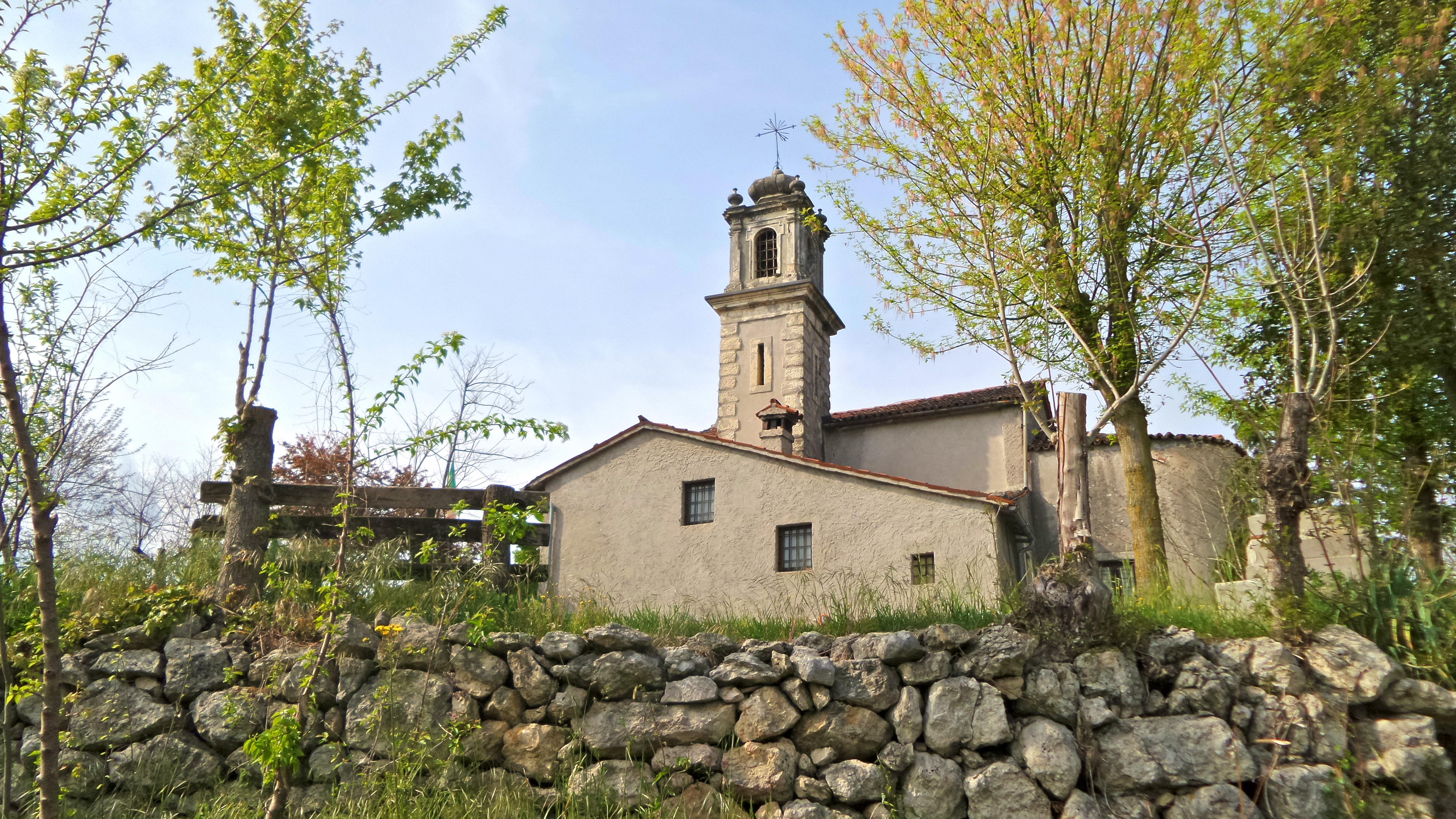 Vista laterale della chiesa di San Giorgio e San Valentino, Castelgomberto